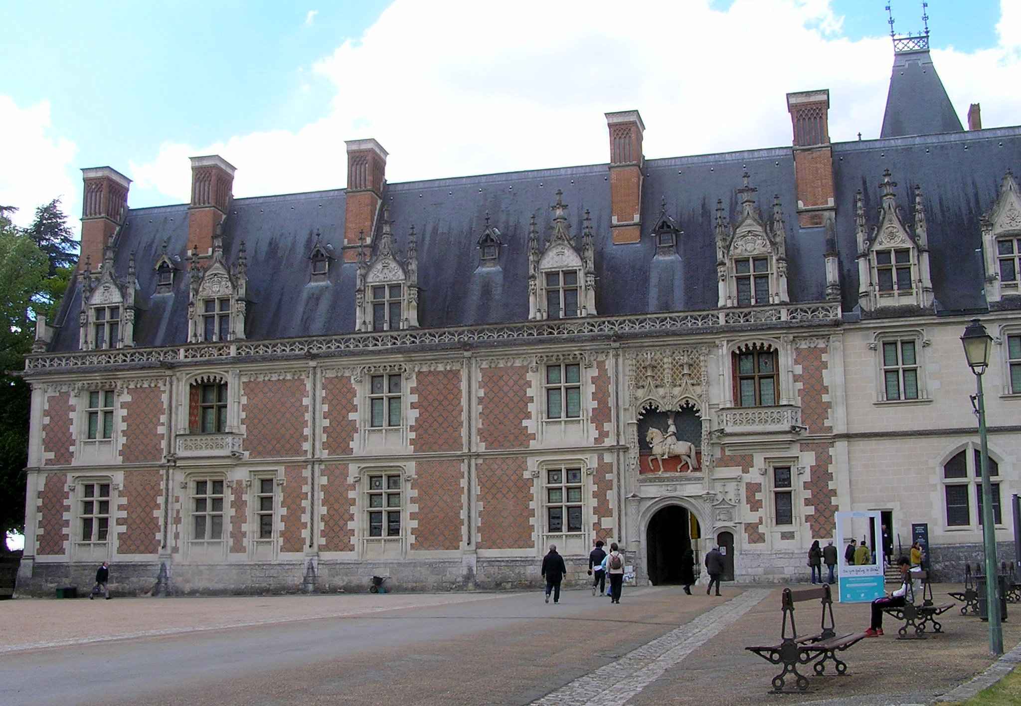 "Qui s'y frotte s'y pique". Début de la construction XIIIéme siècle, fin de la construction XVIIème. Fortement marqué par Louis XII. .